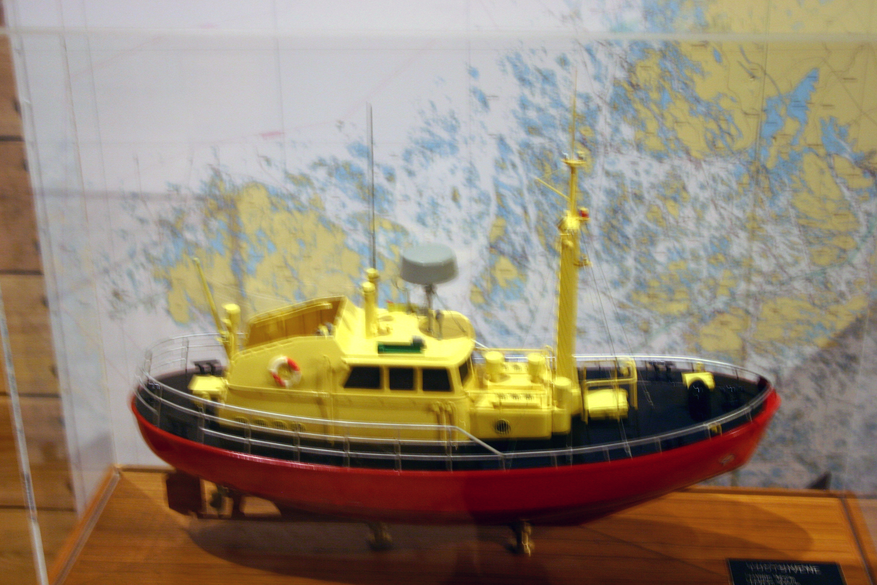 Luotsikutterin pienoismalli